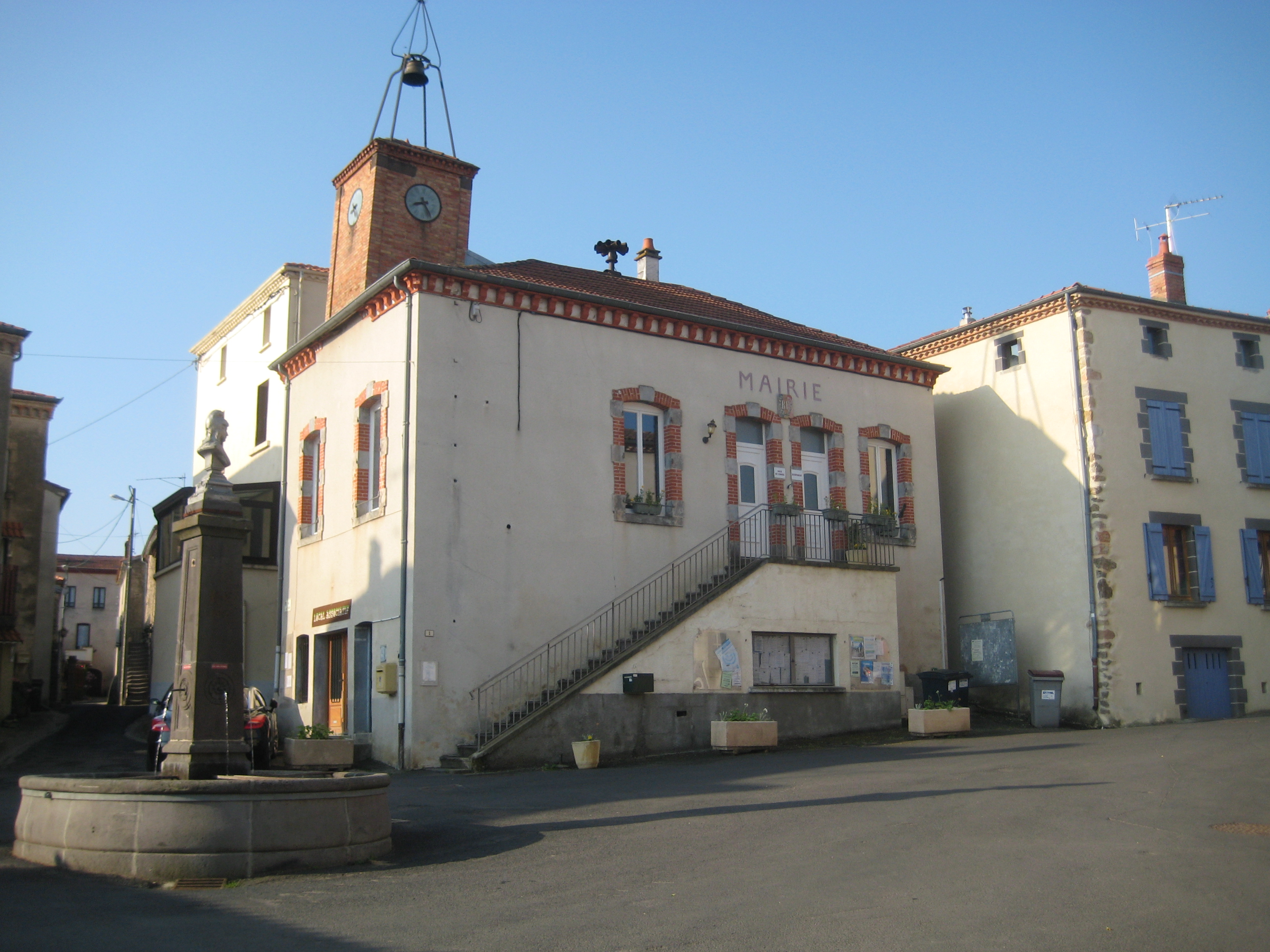 Mairie de Beaulieu (puy-de-dome)